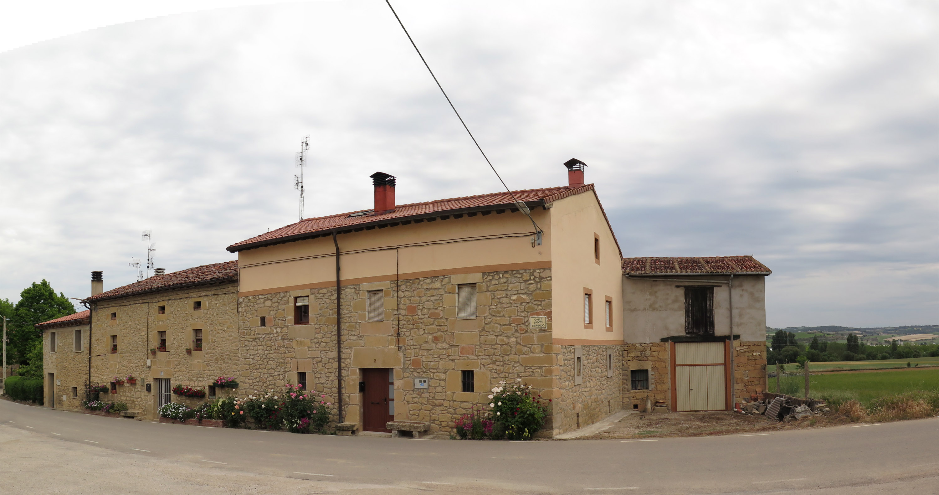 Calle de la localidad de Montañana (Miranda de Ebro), provincia de Burgos (España)